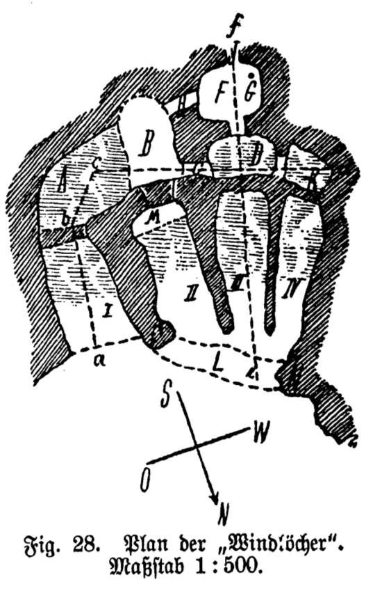 Plan der Windlöcher, eines Höhlensystems am Unterberg, Österreich, von Eberhard Fugger